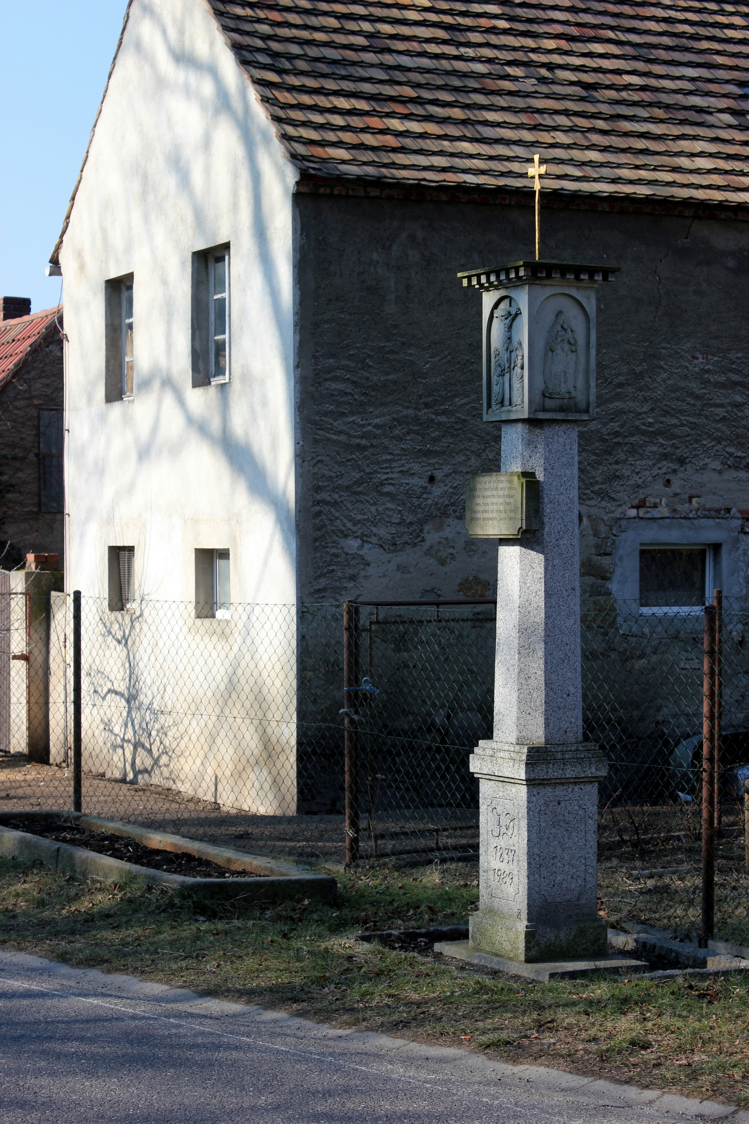 Hornjoserbsce: Pěskecy; modlerski stołp při Kamjenskej.